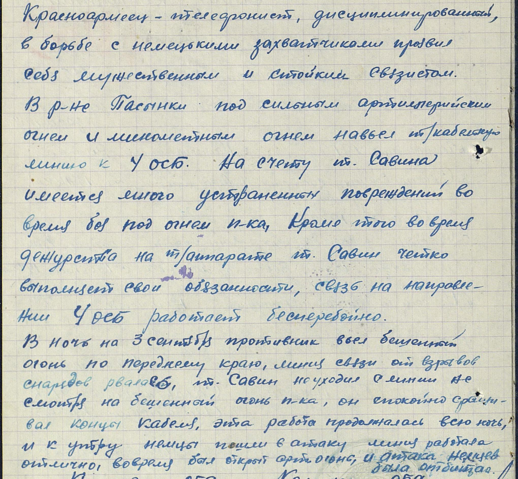 Описание подвига К. Савина представленного к медали «За боевые заслуги»